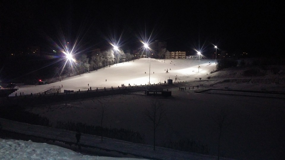 Jonavos žiemos kalnų sporto kompleksas